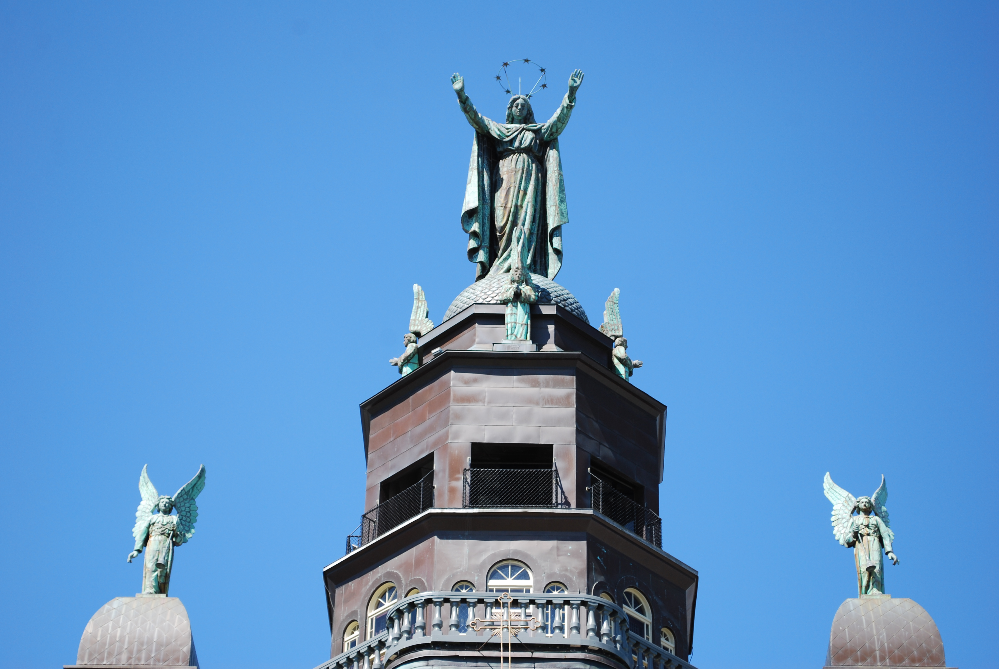 Statues dominant les trois clochers donnant sur le Vieux-Port de la chapelle Notre-Dame de Bon-Secours, dans l'arrondissement historique de Montréal.